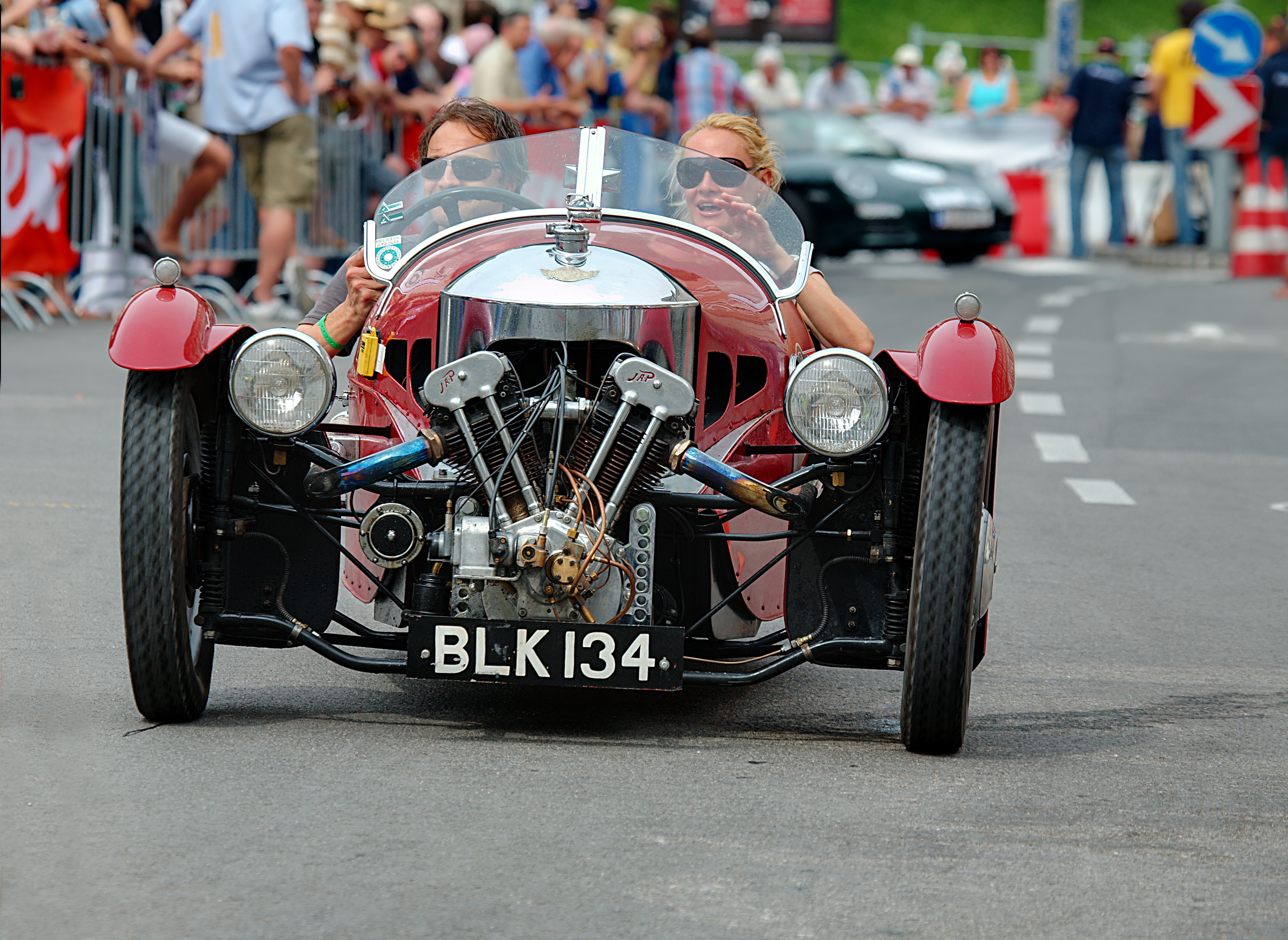 1934 Morgan Super Sports during Gaisbergrennen, Stadtfahrt in Salzburg 2009